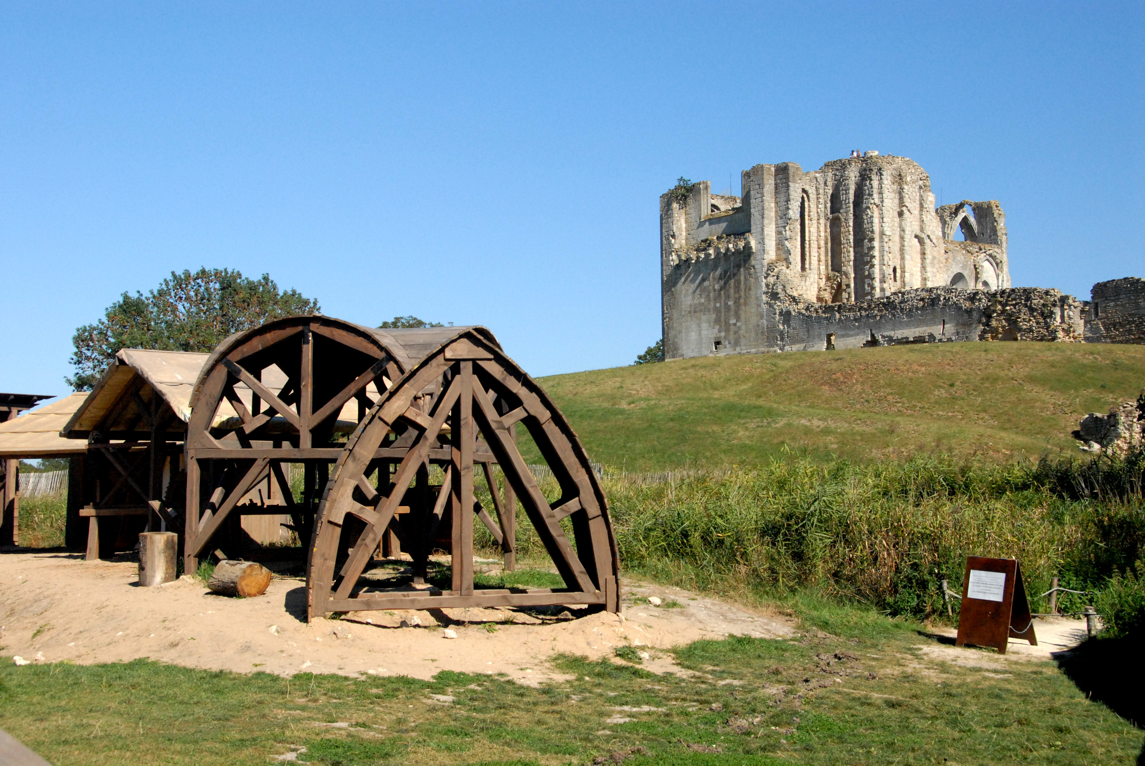 Maillezais,von S-W